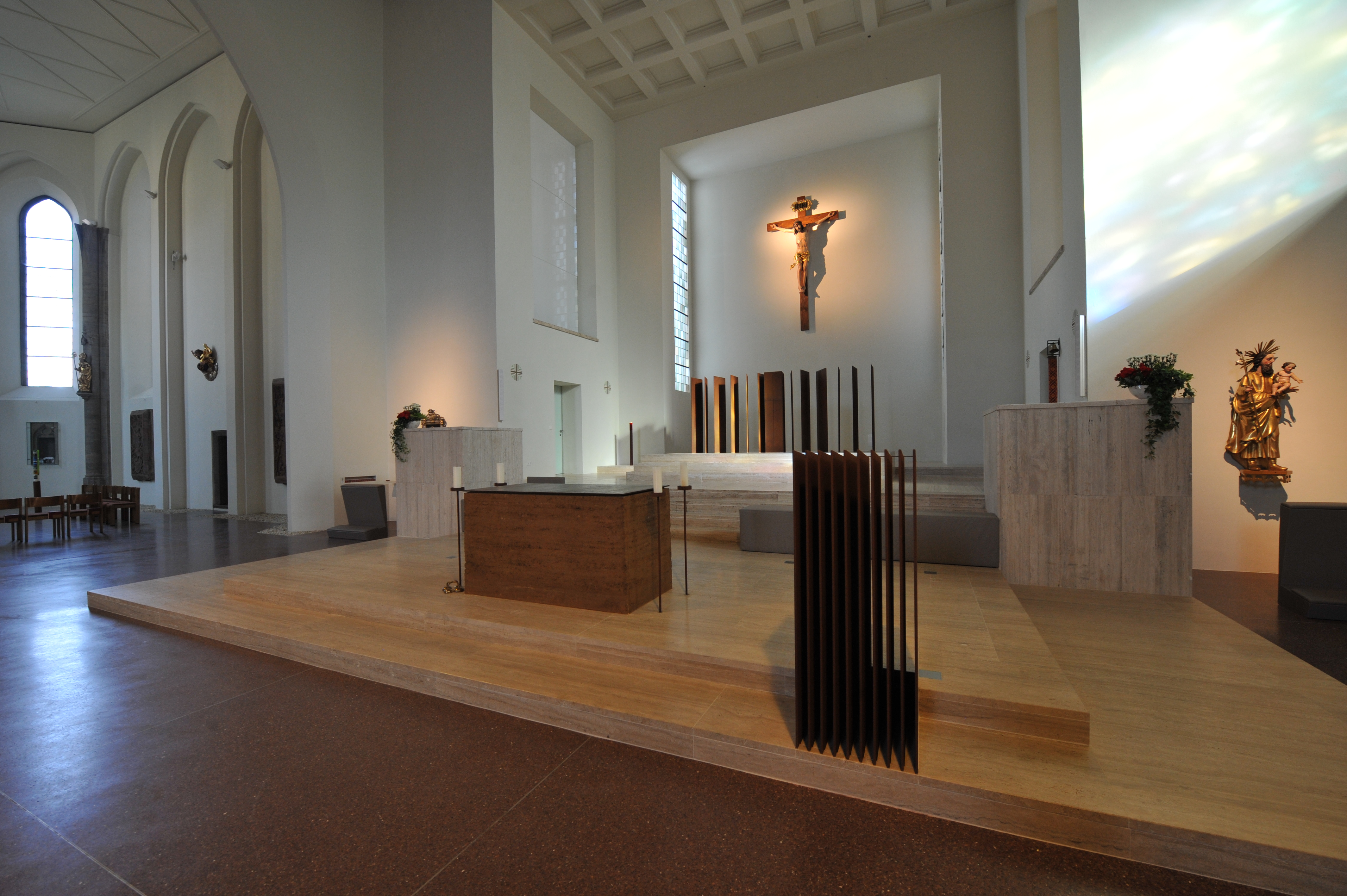 Kath. Pfarrkirche Christus als König und Kirchhofmauer Dieses Foto wurde im Rahmen des von Wikimedia Österreich unterstützten Projekts Wiki takes oberes Murtal erstellt. The making of this work was supported by Wikimedia Austria. For other files made with the support of Wikimedia Austria, please see the category Supported by Wikimedia Österreich. Object location47° 12′ 47.6″ N, 14° 49′ 49.95″ E